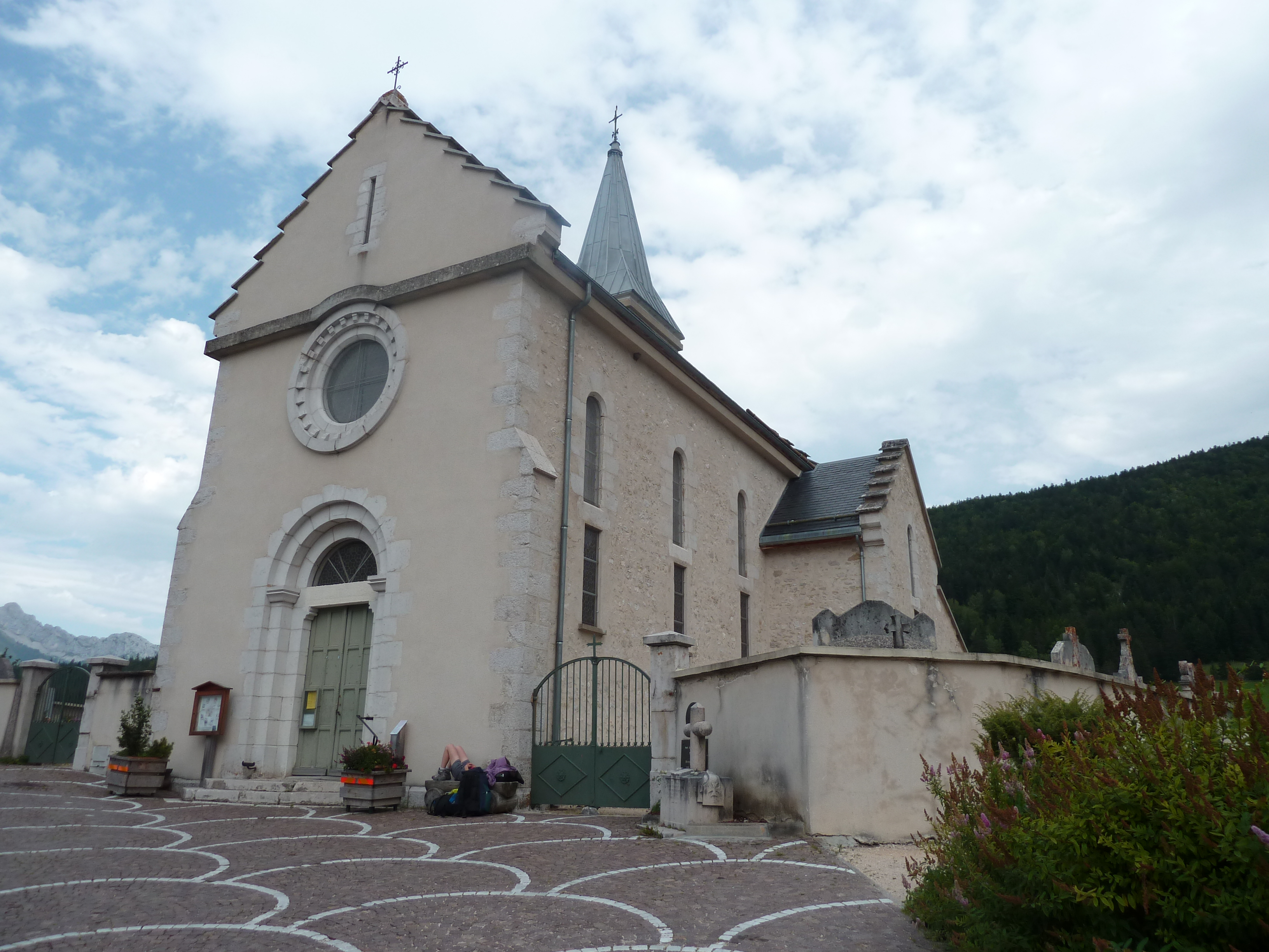 Corrençon-en-Vercors (38) : L'église Sainte-Croix.